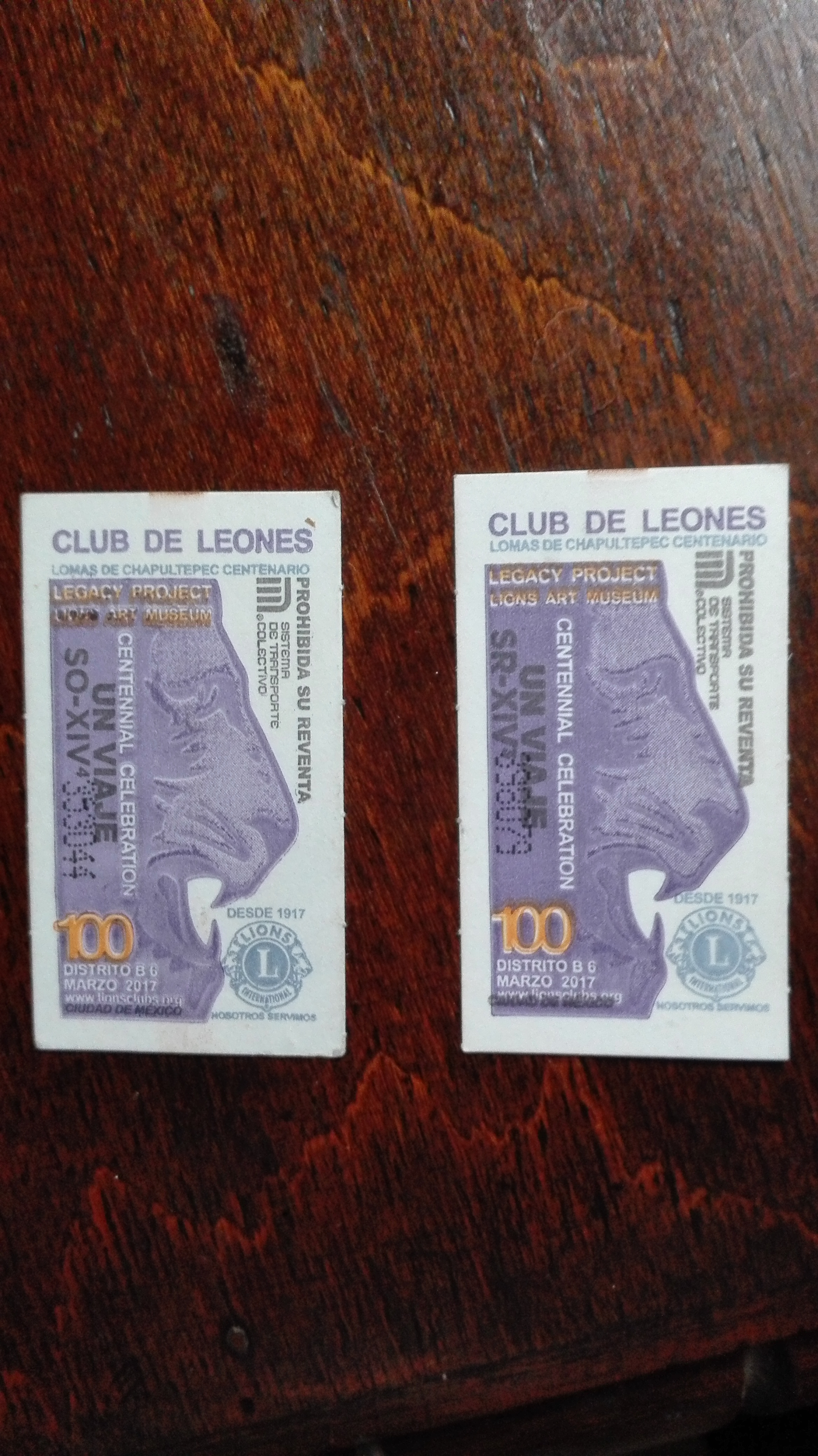 Un boleto del Metro (Sistema de Transporte Colectivo) de la Ciudad de México en el que se conmemora el centenario del Club de Leones.